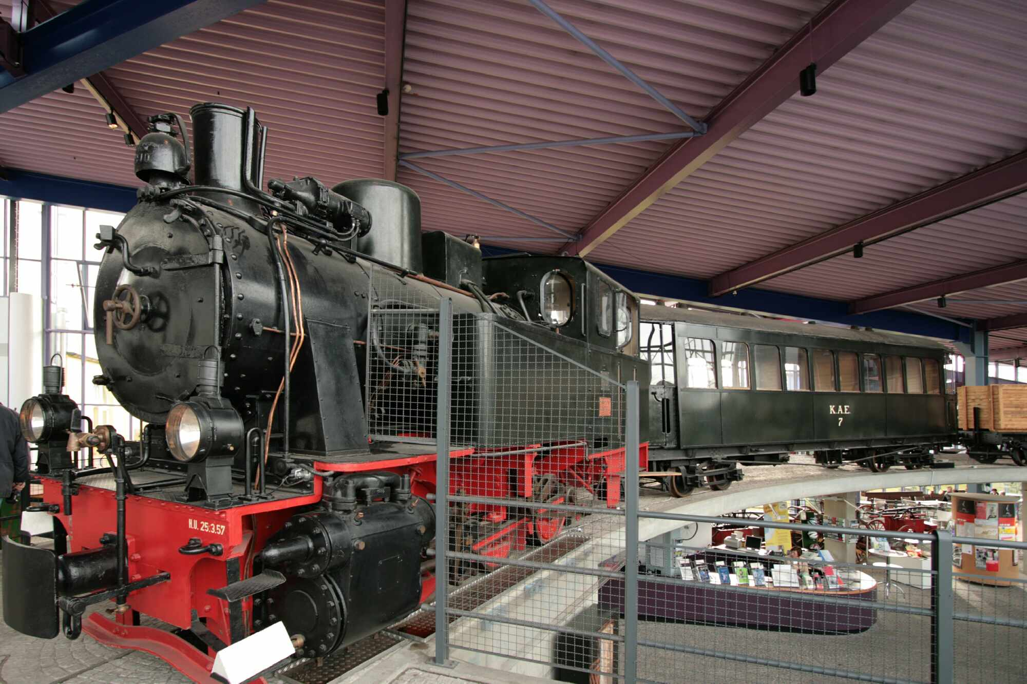 Lüdenscheid, Geschichtsmuseum Ansicht